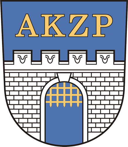 Municipal coat of arms of Vlašim, Czech Republic.